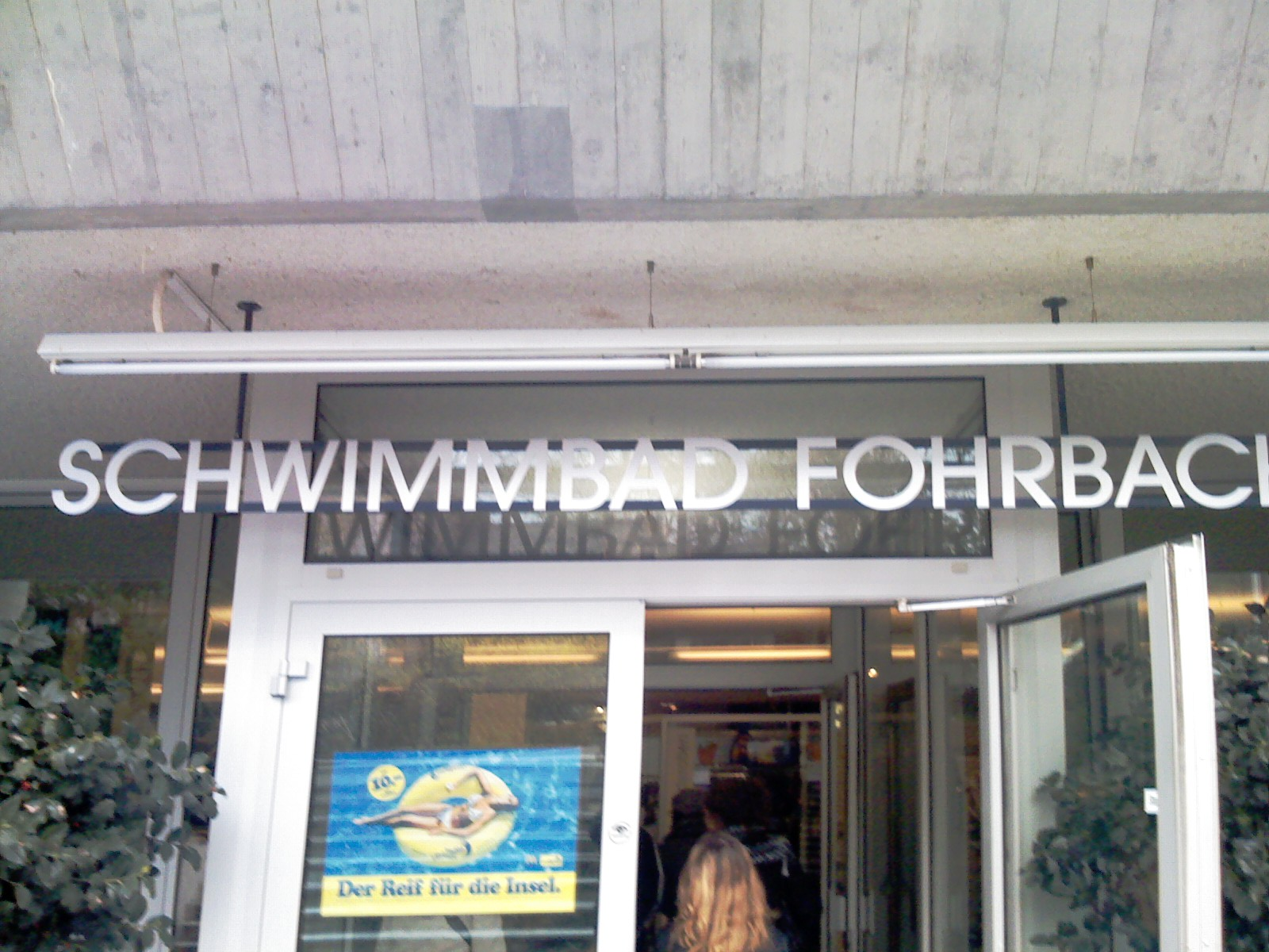 Bain Fohrbach at Zollikon, entry - Banejo Fohrbach en Zollikon, enirejo